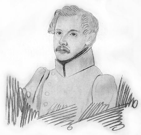 Василий Павлович Колесников, осужденный в 1827 году по делу Оренбургского тайного общества, в Сибири